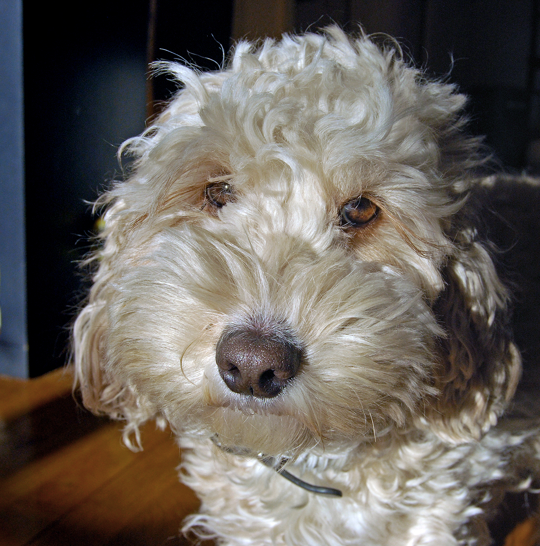 5-årig svensk Cockerpoo hona.